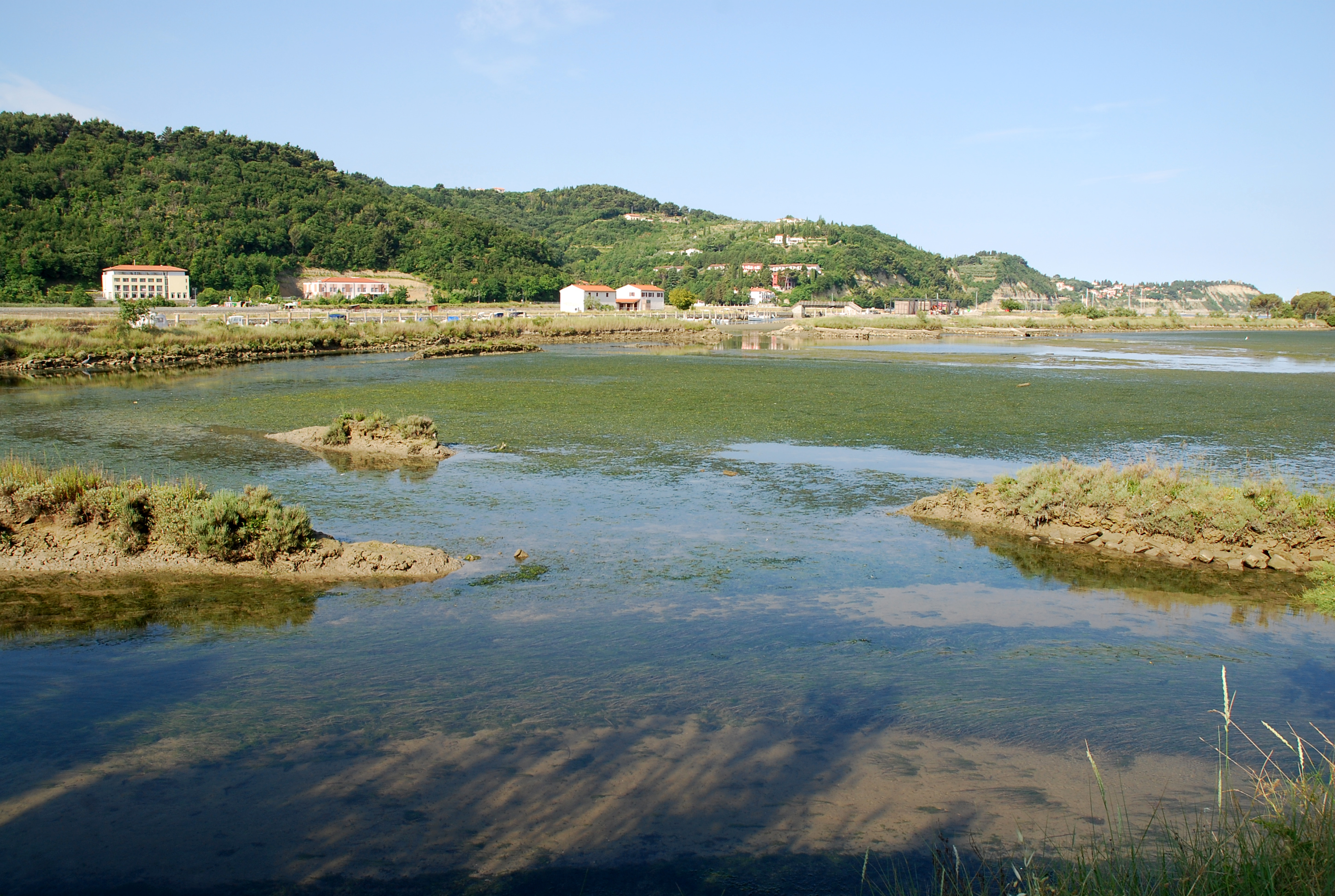 Pohled na část přírodní rezervace Strunjan – Stjuža